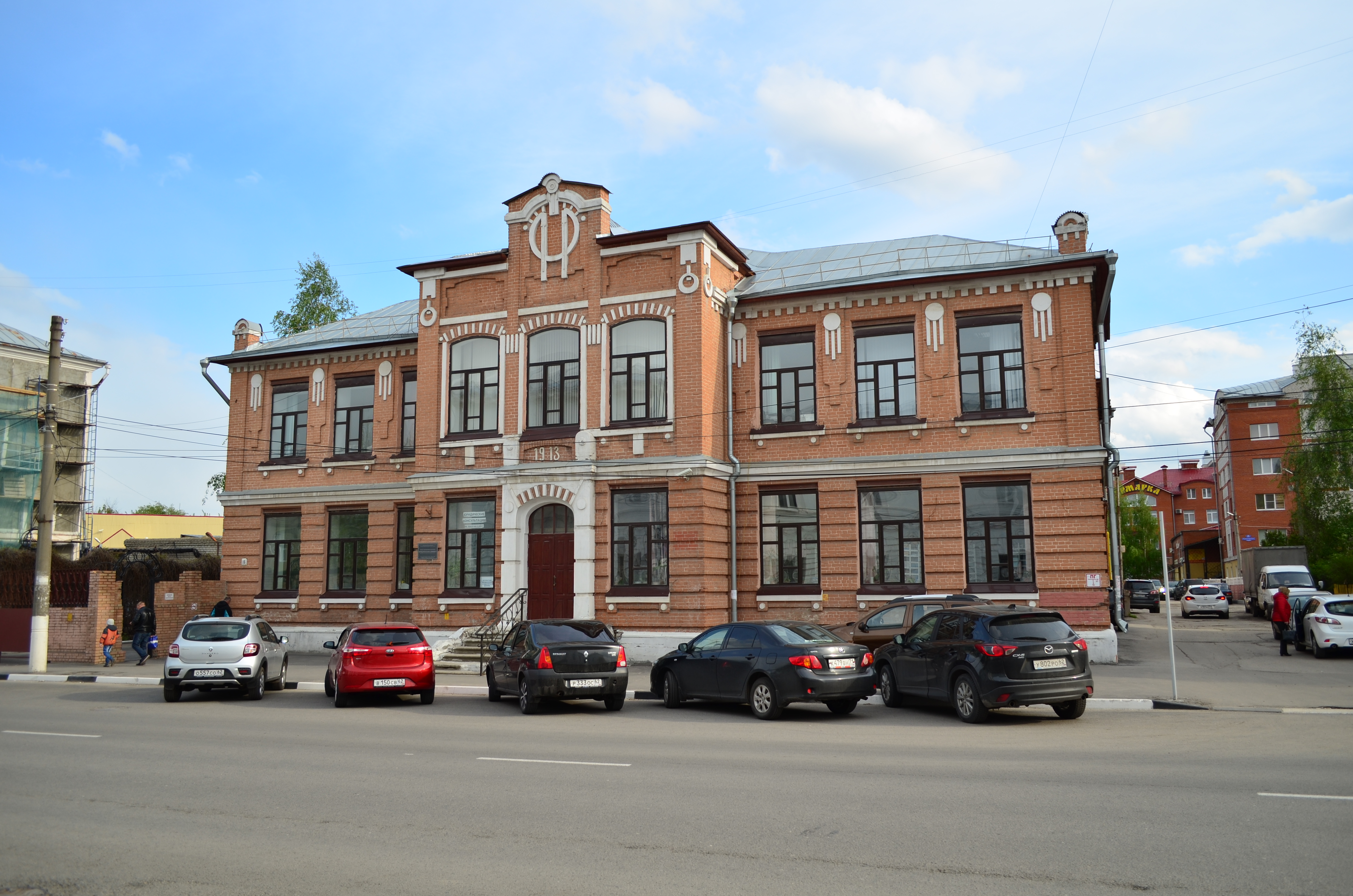 Рязань,Семинарская,15.